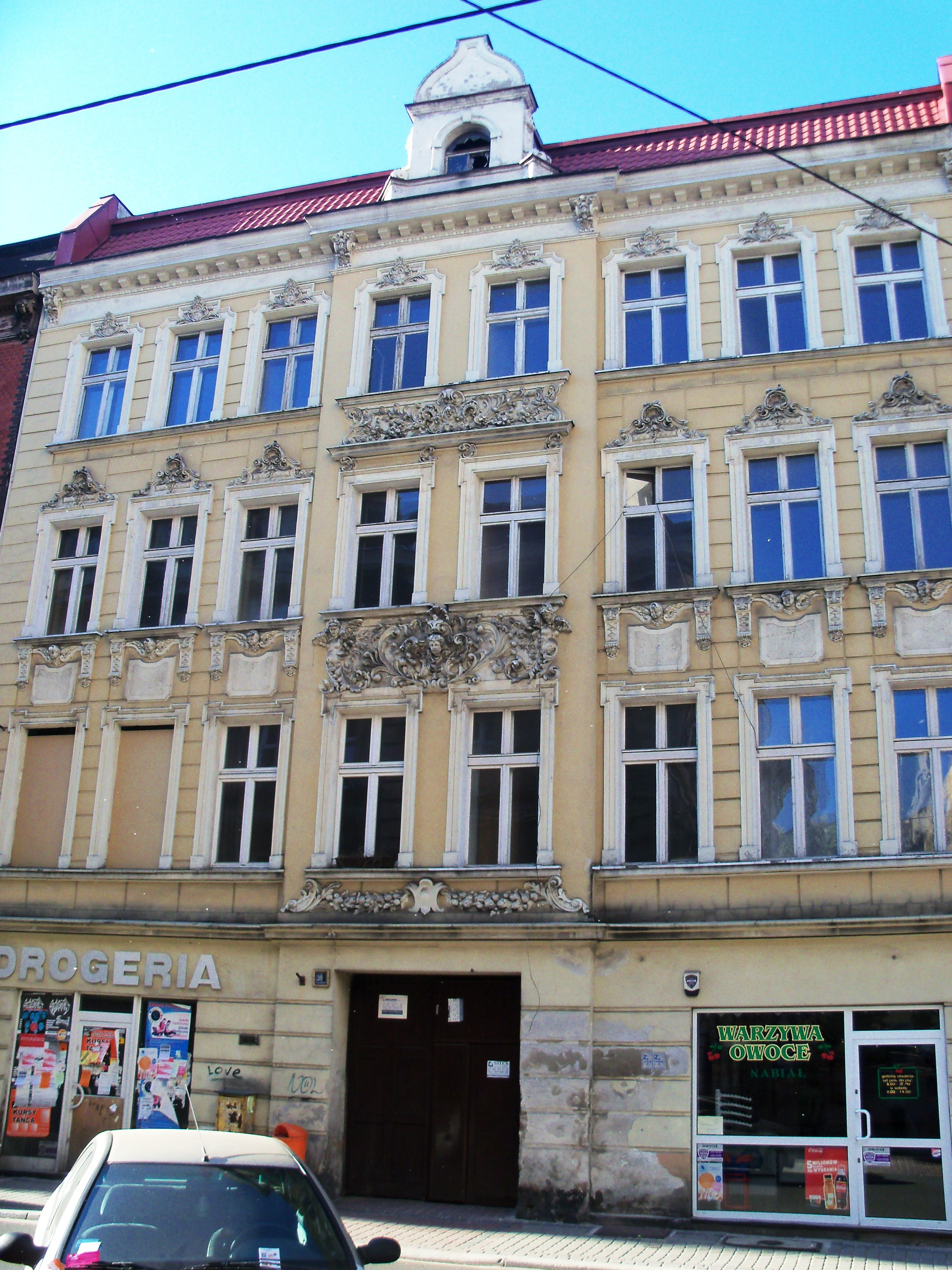 Zabytkowa kamienica przy ul. Wojewódzkiej 38 w Katowicach